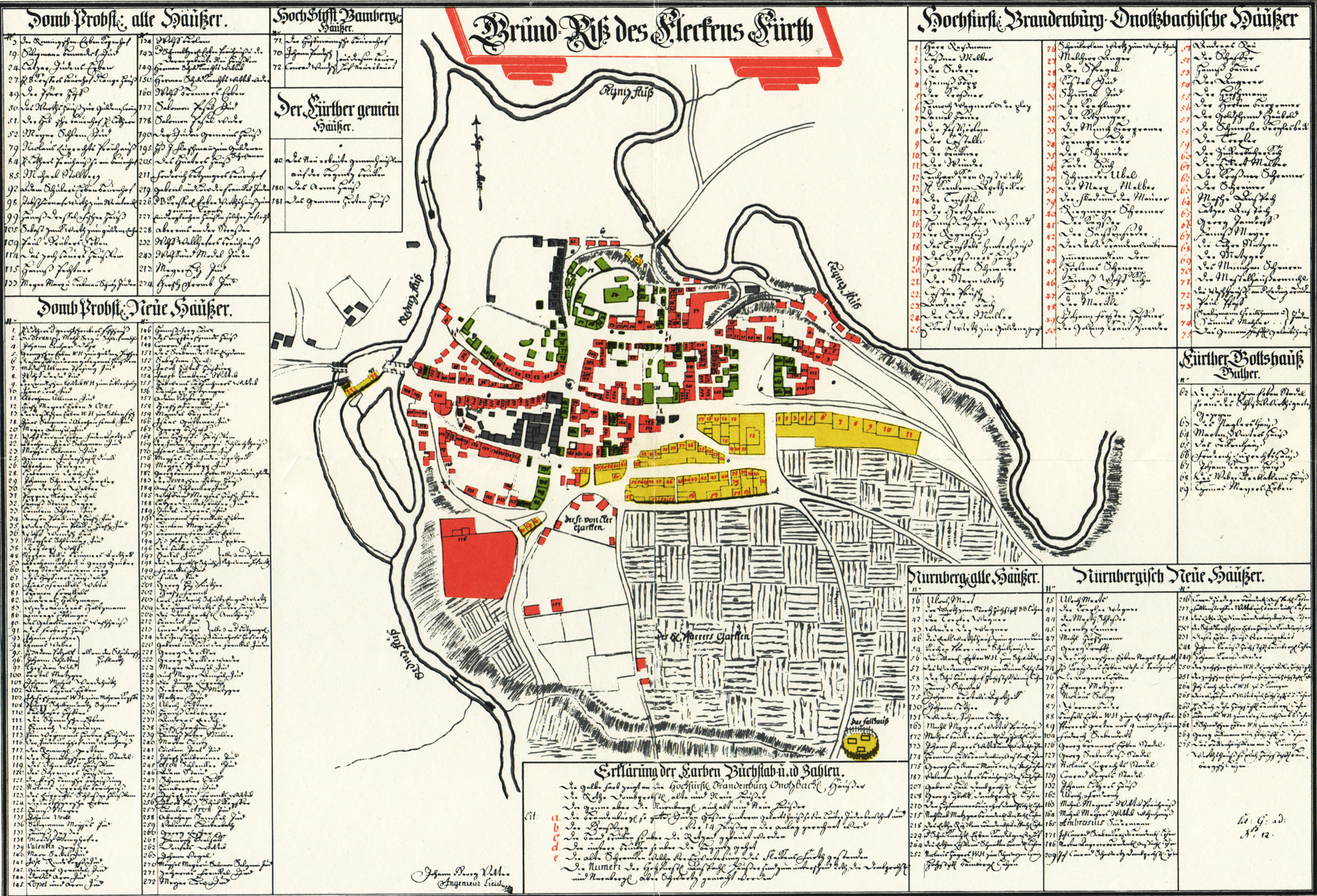 "Grund Riß des Fleckens Fürth" von Johann Georg Vetter 1717. Grün: Nürnberger Anwesen. Gelb: Ansbach. Rot Domprobst Bamberg. Grau: Gemeinde